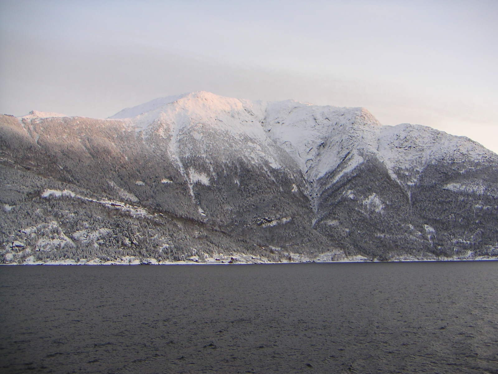 Tjoflot, fjellet Oksen, Utnefjorden. Biletet er teke på ferja mellom Kvanndal og Utne.